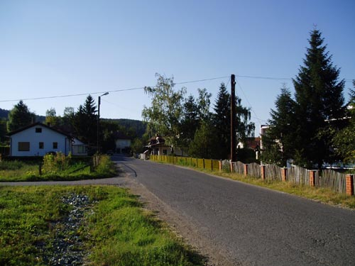 Kakmuž